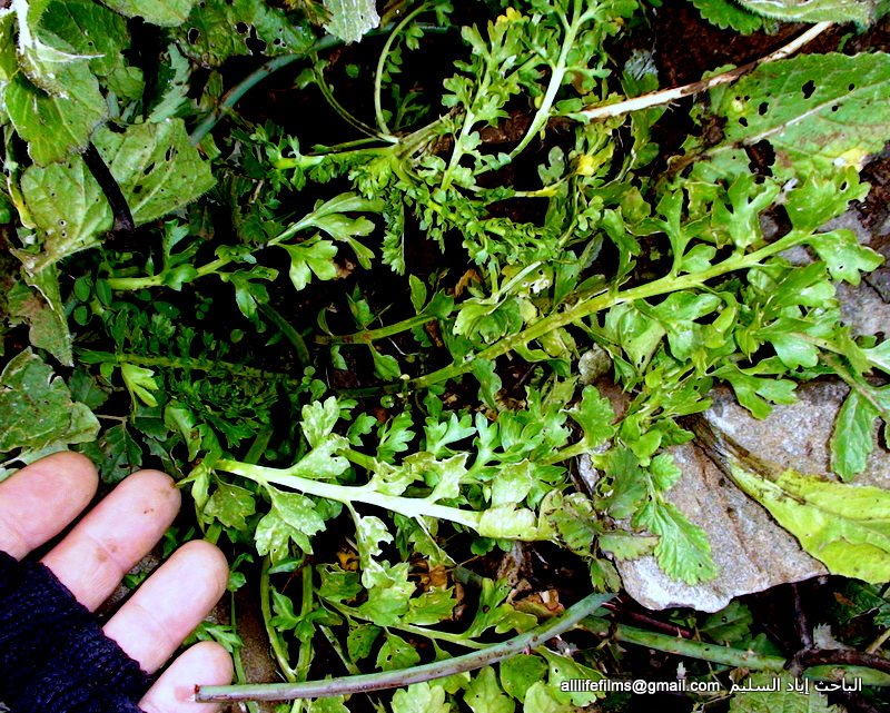 نباتات برّية سورية تؤكل